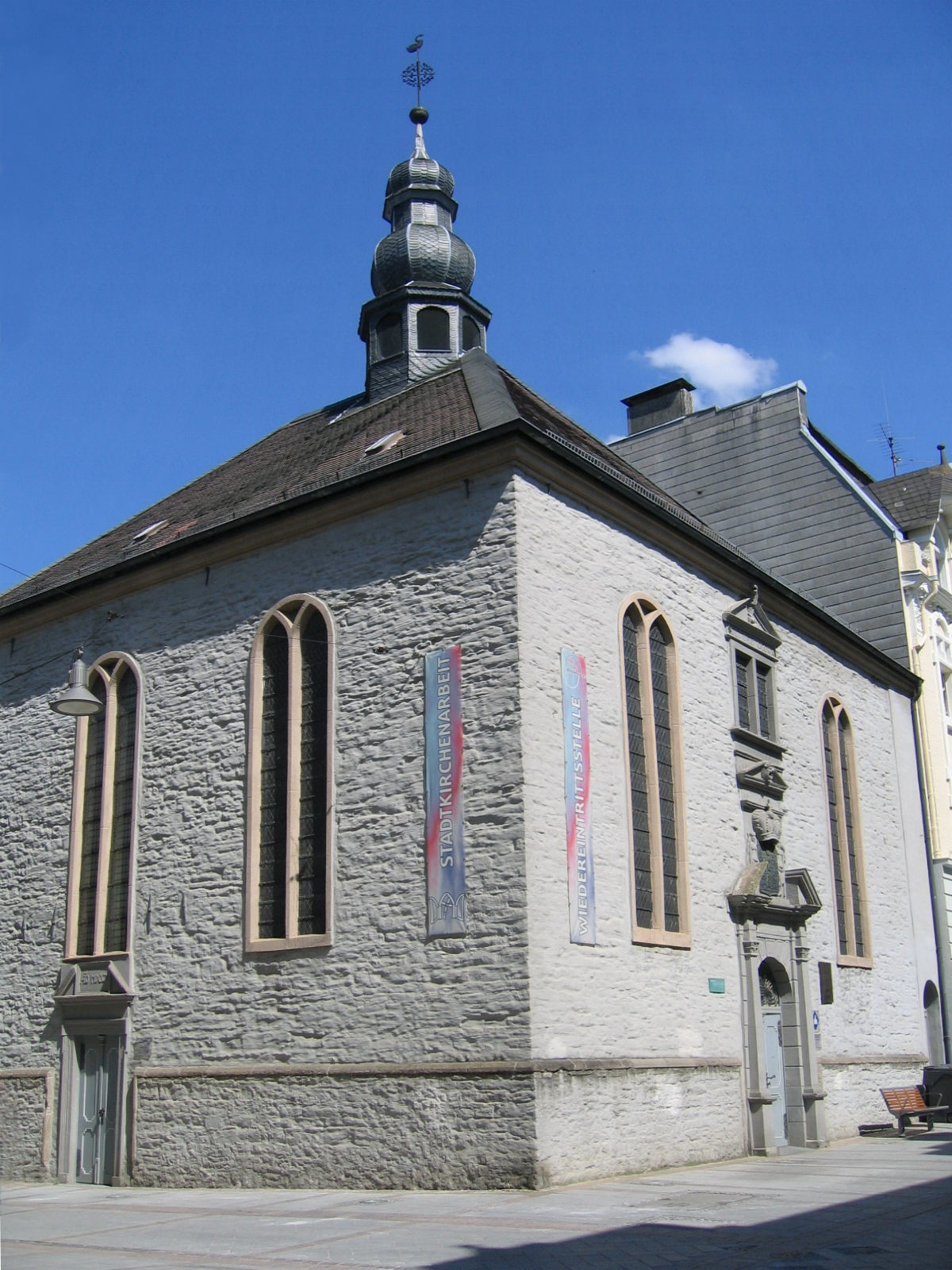 Reformierte Kirche in der Fußgängerzone (Wermingser Straße) in Iserlohn.